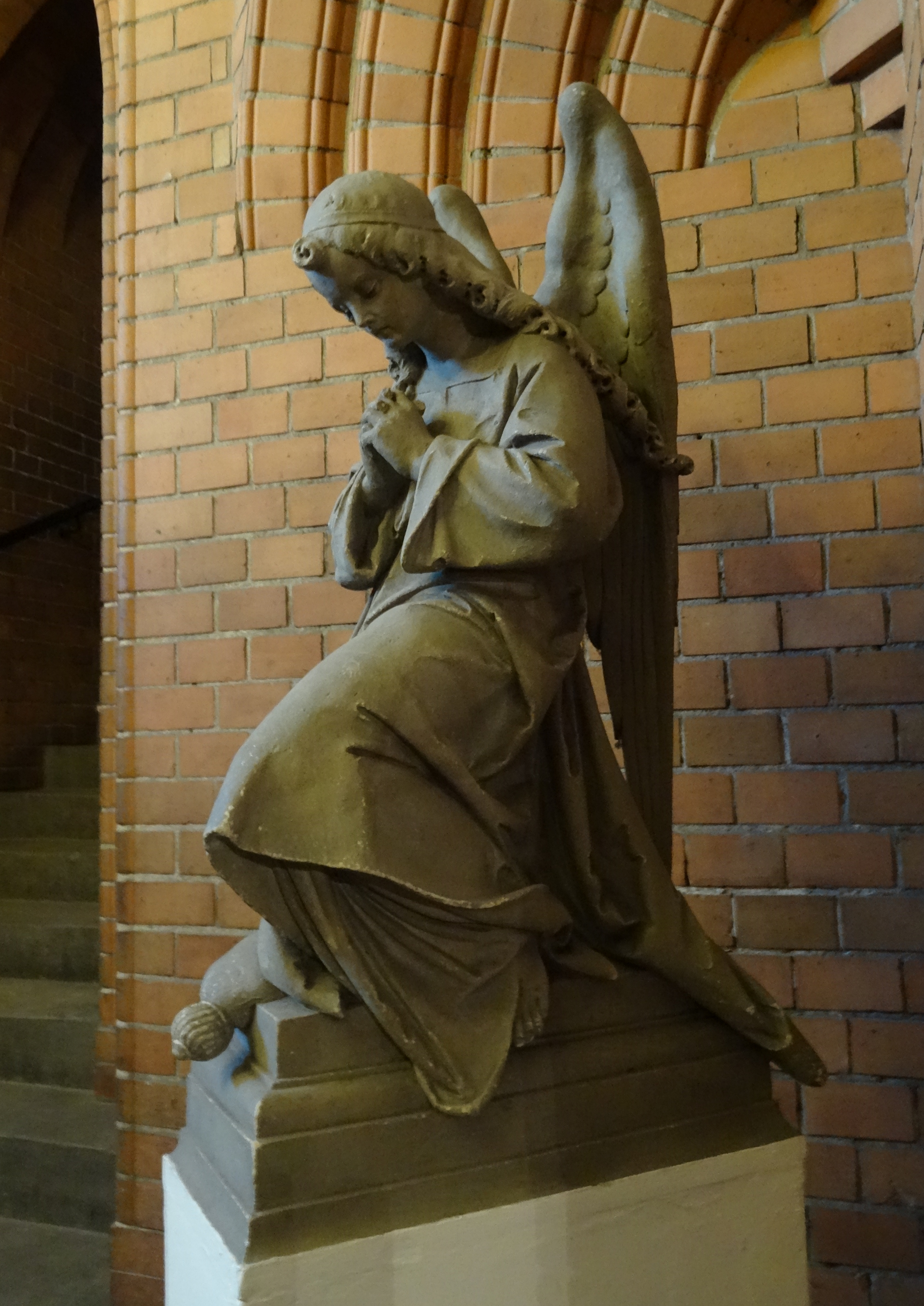 Aloys Denoth schuf 1892 zwei Engel, die ursprünglich den Hochaltar flankierten. Jetzt stehen sie am Eingang zum Kirchenschiff - hier der Engel auf der linken Seite. Sie sind ca. 1 Meter hoch.